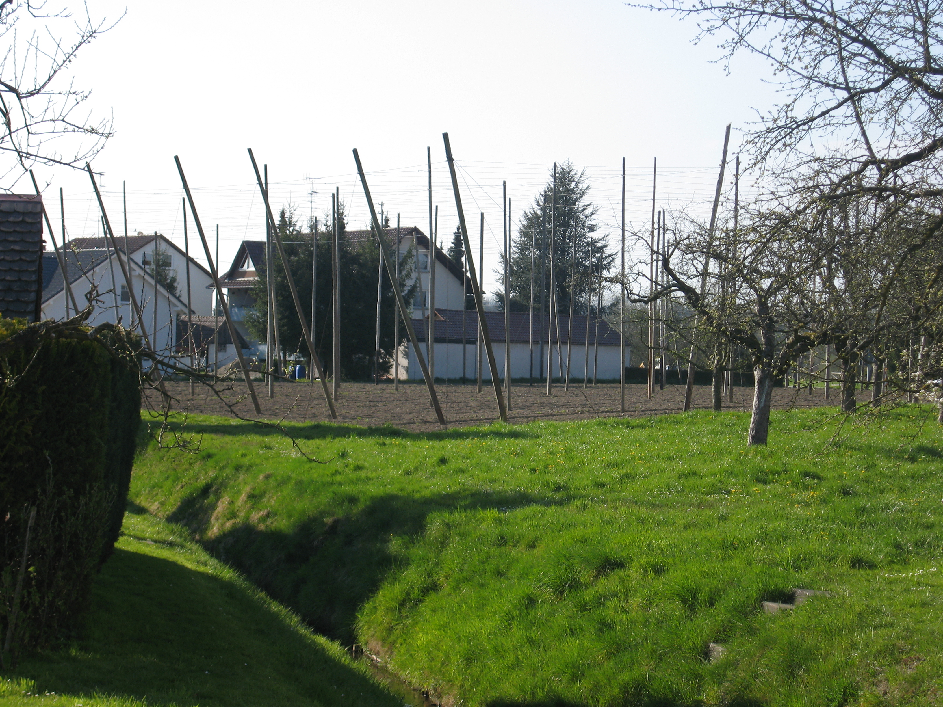 Kauer Bach und Hopfengarten in Kau, Stadtteil von Tettnang